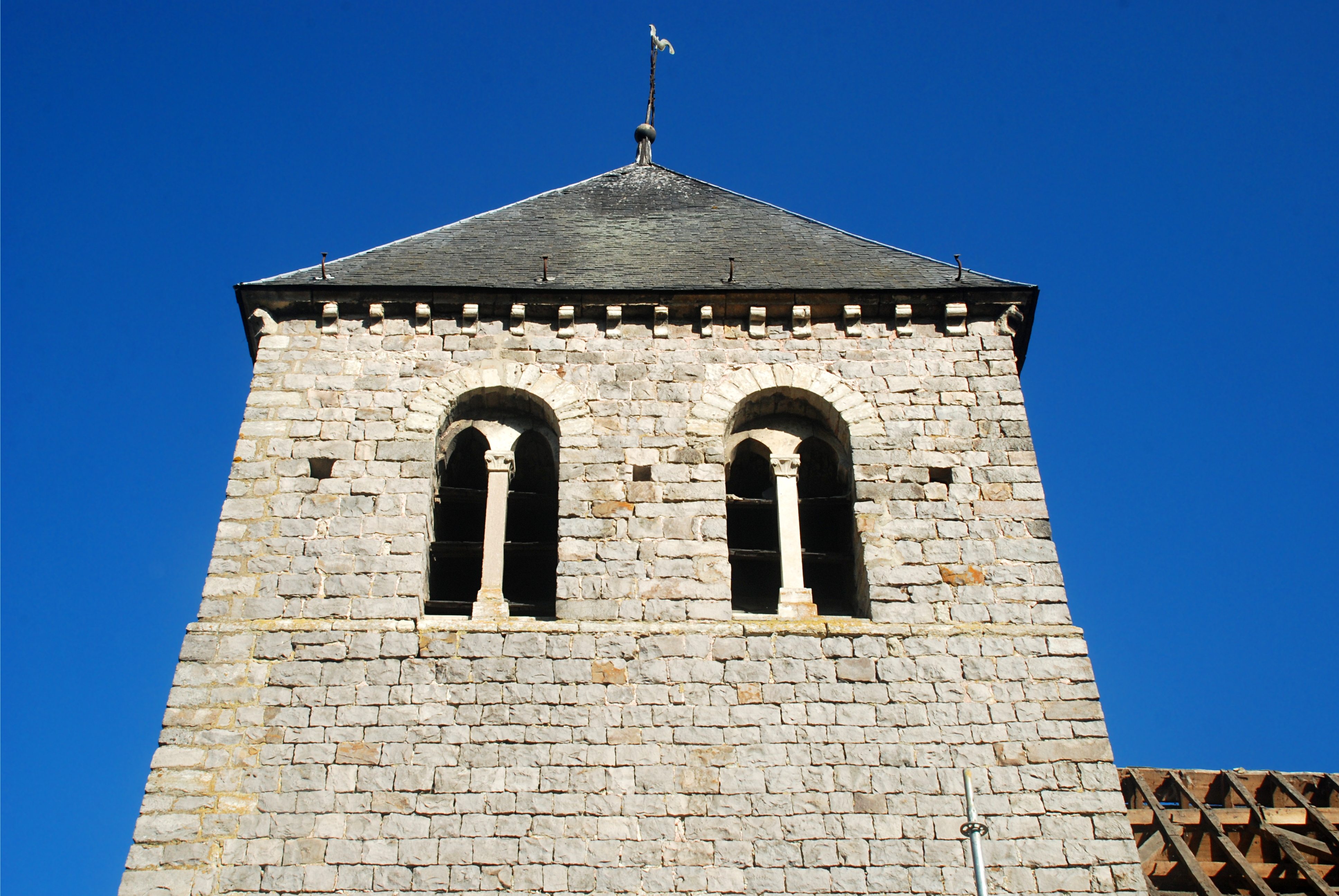 Belgique - Brabant flamand - Tirlemont - Église Saint-Lambert de Groot-Overlaar